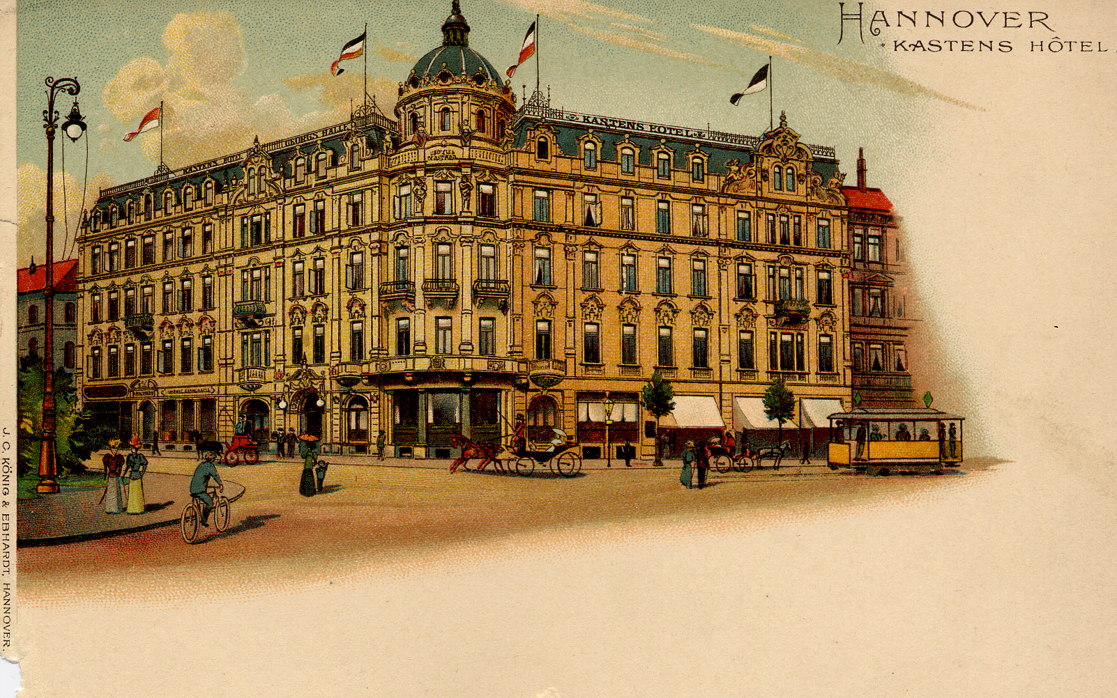 Beeindruckendes Ensemble: Kastens Hotel im Jahr 1910.